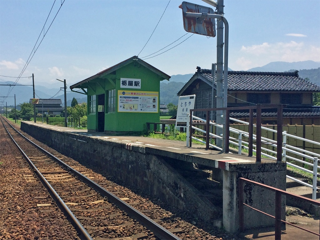 富山地方鉄道本線 栃屋駅